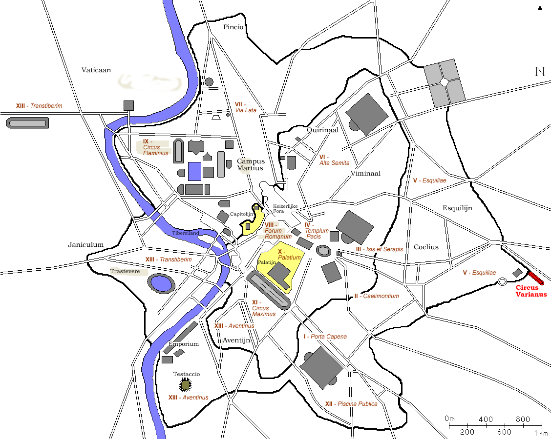 Kaart van antiek Rome waarop het Circus Varianus is uitgelicht. Kaart is afkomstig van FR:wiki en door mij naar een Nederlandse versie bewerkt. Auteurs: nl::fr:User:ColdEel en Gebruiker:Joris1919